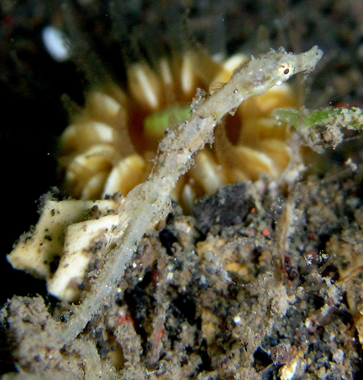 Pygmy Pipehorse (Acentronura breviperula Syn. Acentronura tentaculata)